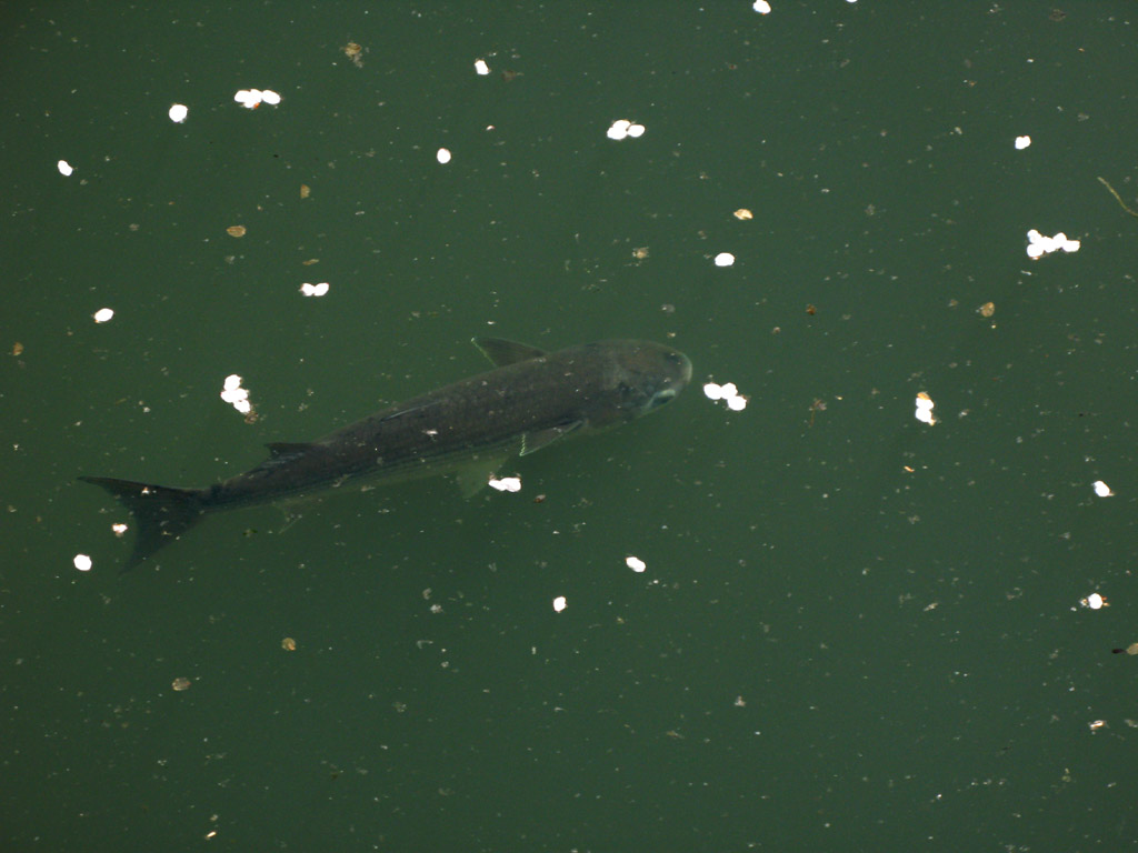 Mugil cephalus .